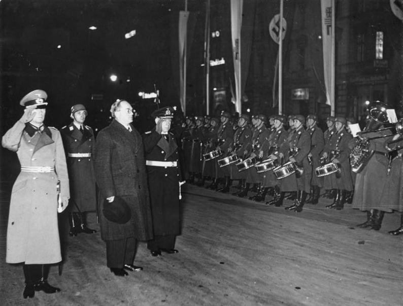 Scherl: Der südafrikanische Verteidigungs- und Sicherheitsminister Pirow verliess gestern abend Berlin. UBz: während der Nationalhymne von rechts: Admiral Canares, der in Vertretung für Generaloberst Keitel erschienen war, Minister Pirow und der Kommandant von Berlin Generalleutnant Seifert. Fot. Wag 27.11.1938